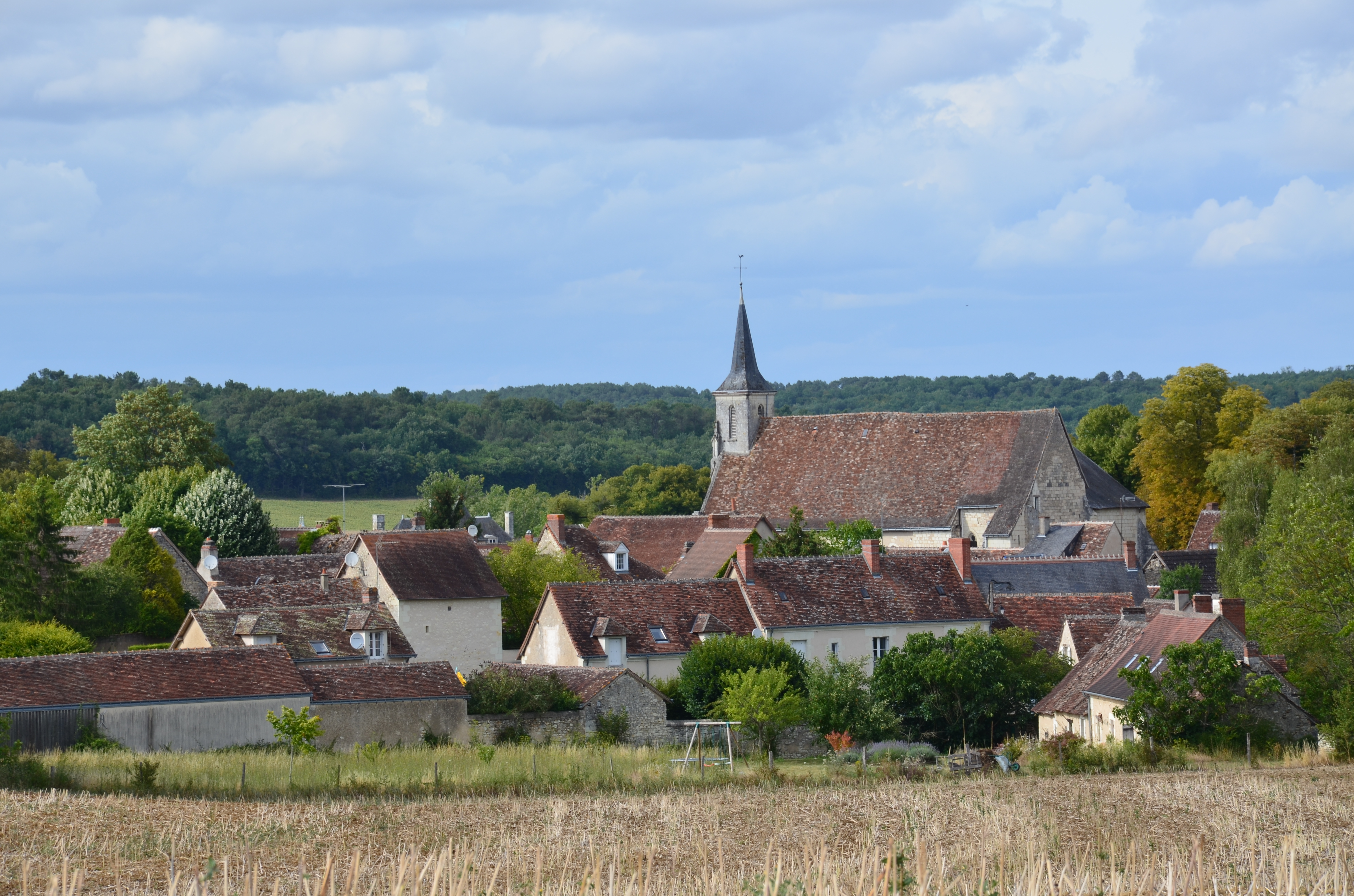 Vue générale du village de Boussay (Indre et Loire, France).